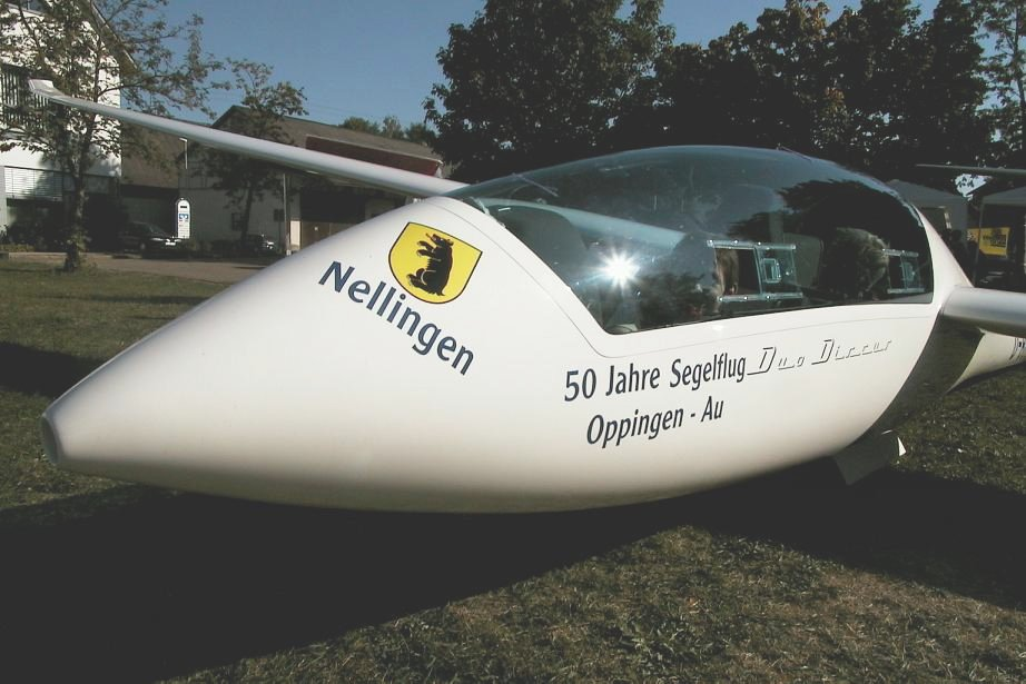 Schempp-Hirth Duo Discus der Fliegergruppe Gingen/Fils